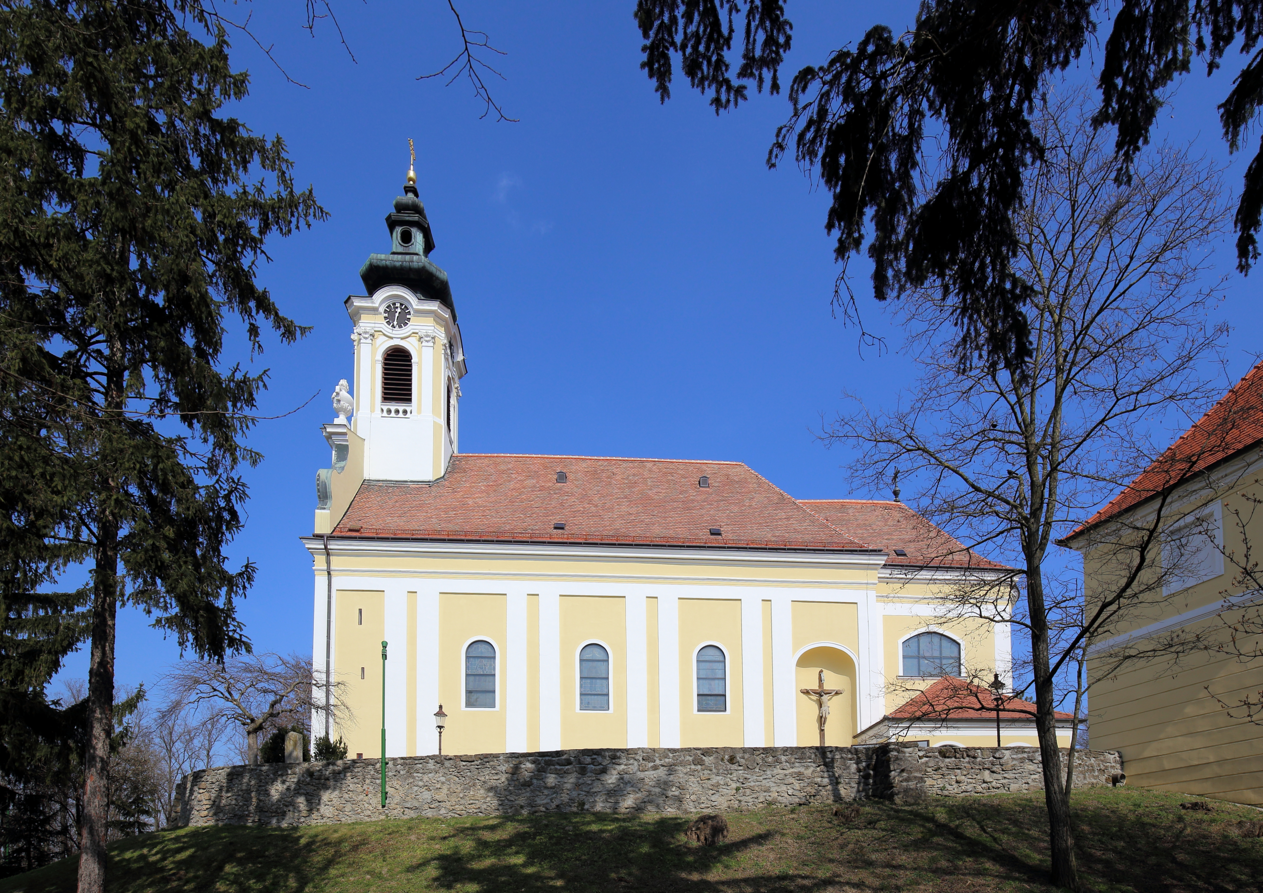 Südsüdwestansicht der katholischen Pfarrkirche hll. Barbara und Agatha in der niederösterreichischen Marktgemeinde Bad Pirawarth. Ein anstelle einer mittelalterlichen Wehrkirche auf dem Hausberg errichter barocker Sakralbau, der teilweise noch von der ursprünglichen Wehrmauer umgeben ist.